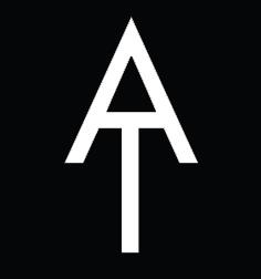 Logo Oficial de Alvaro Torres